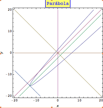 Esta gráfica representa una parábola girada un determinado ángulo.